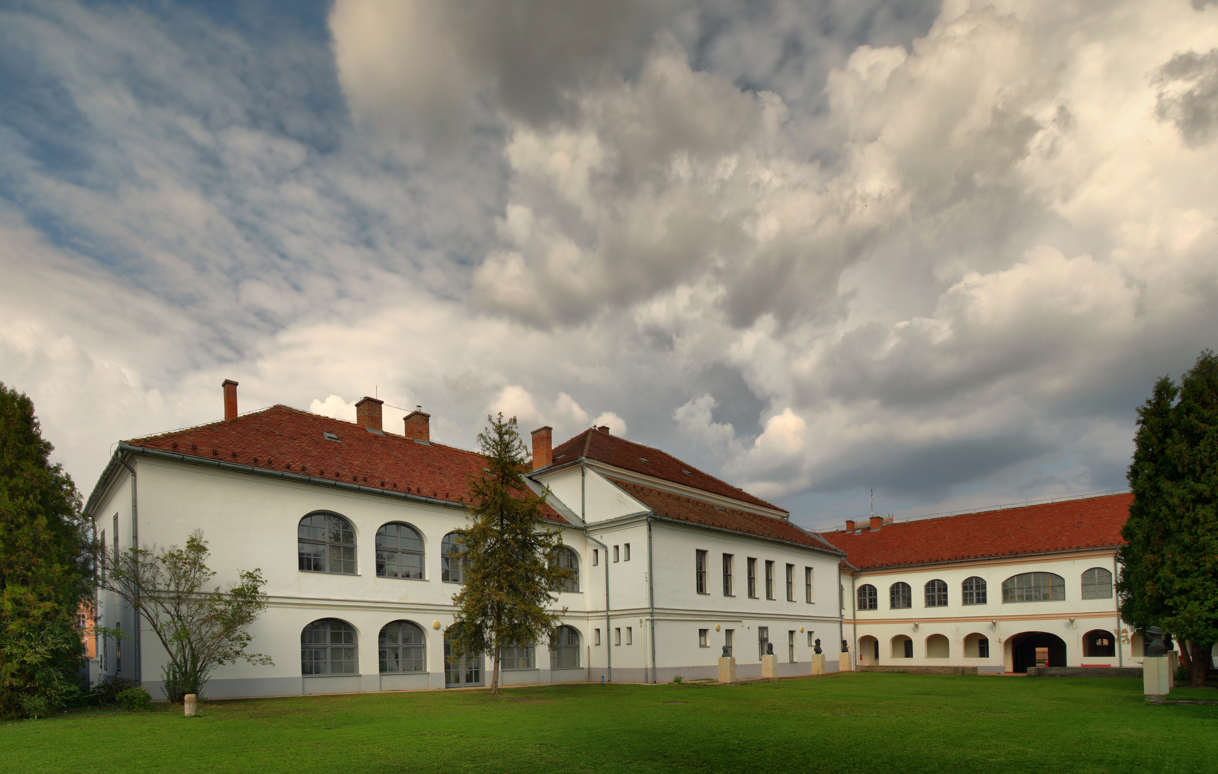 Hajdúszékház. azonosító 5300 (törzsszám 1817). -Hajdúböszörmény, Kossuth u. 1. Múzeum, bíróság, földhivatal, egykori Hajdúszékház, barokk, 17-18. sz. Főhomlokzata átalakítva a 19. sz. második felében. This is a photo of a monument in Hungary. Identifier: 5300